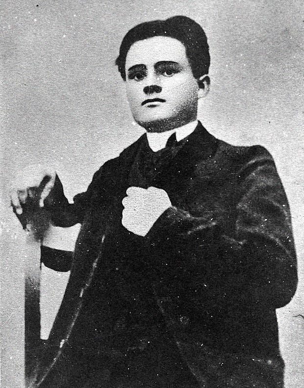 Stefan Okrzeja,działacz PPS i Organizacji Bojowej PPS